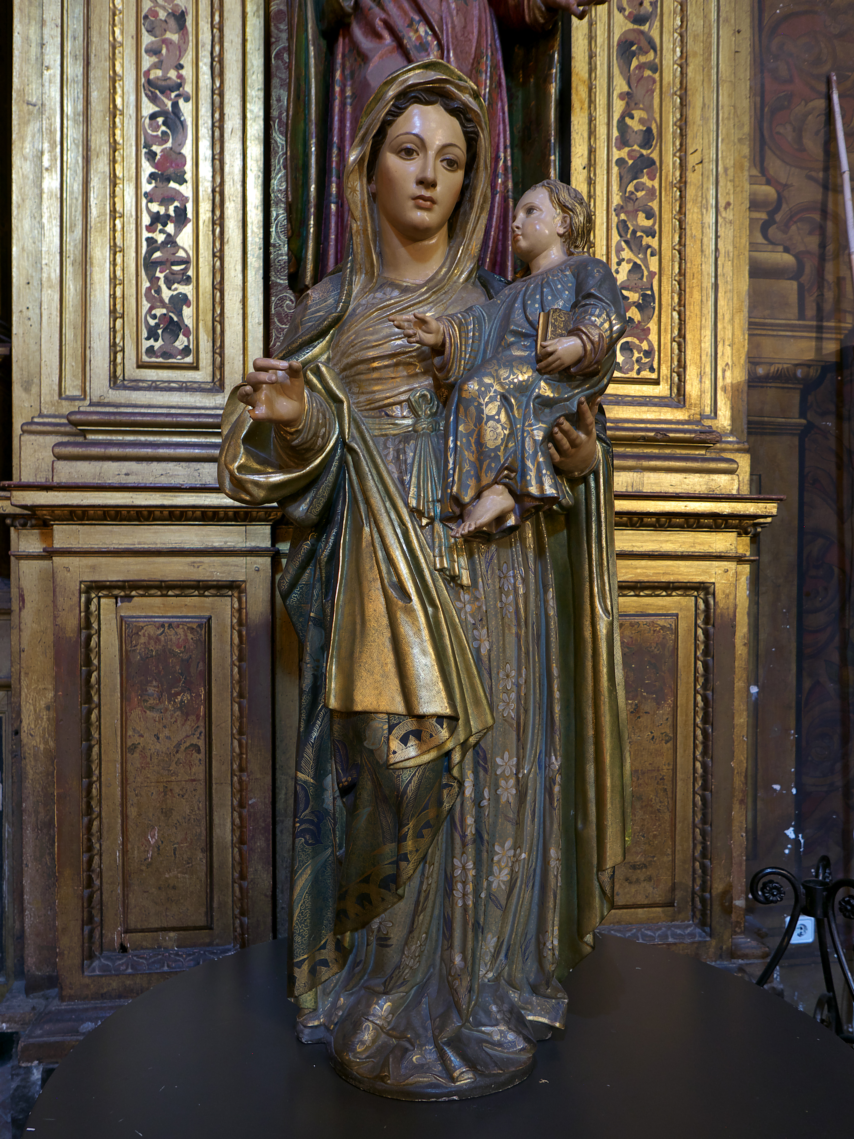 Iglesia de la Anunciación (Sevilla). Talla manierista (h. 1585) atribuida con seguridad a Juan Bautista Vázquez el Mozo. La policromía no es la original.